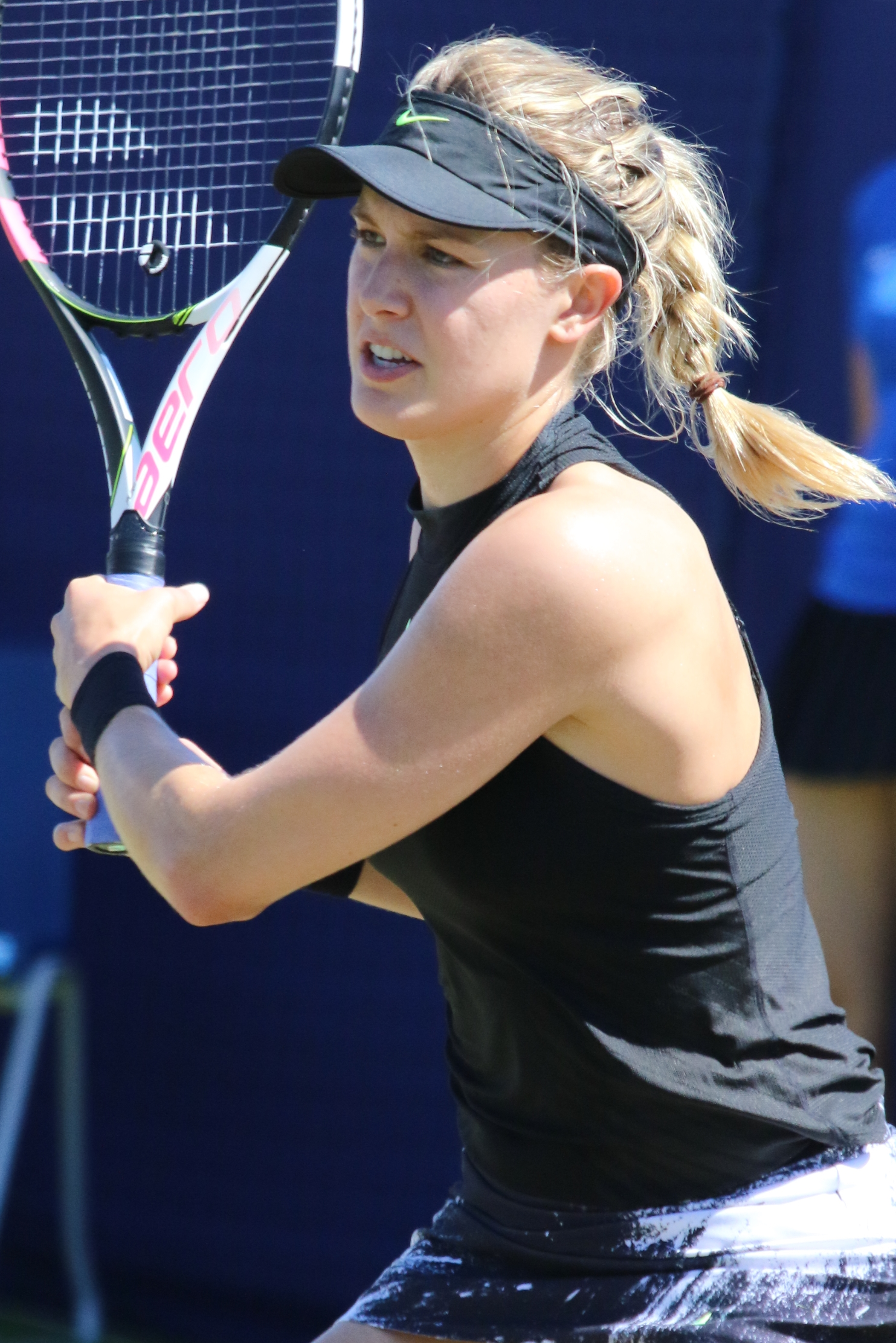 Bouchard EBN17 (58)